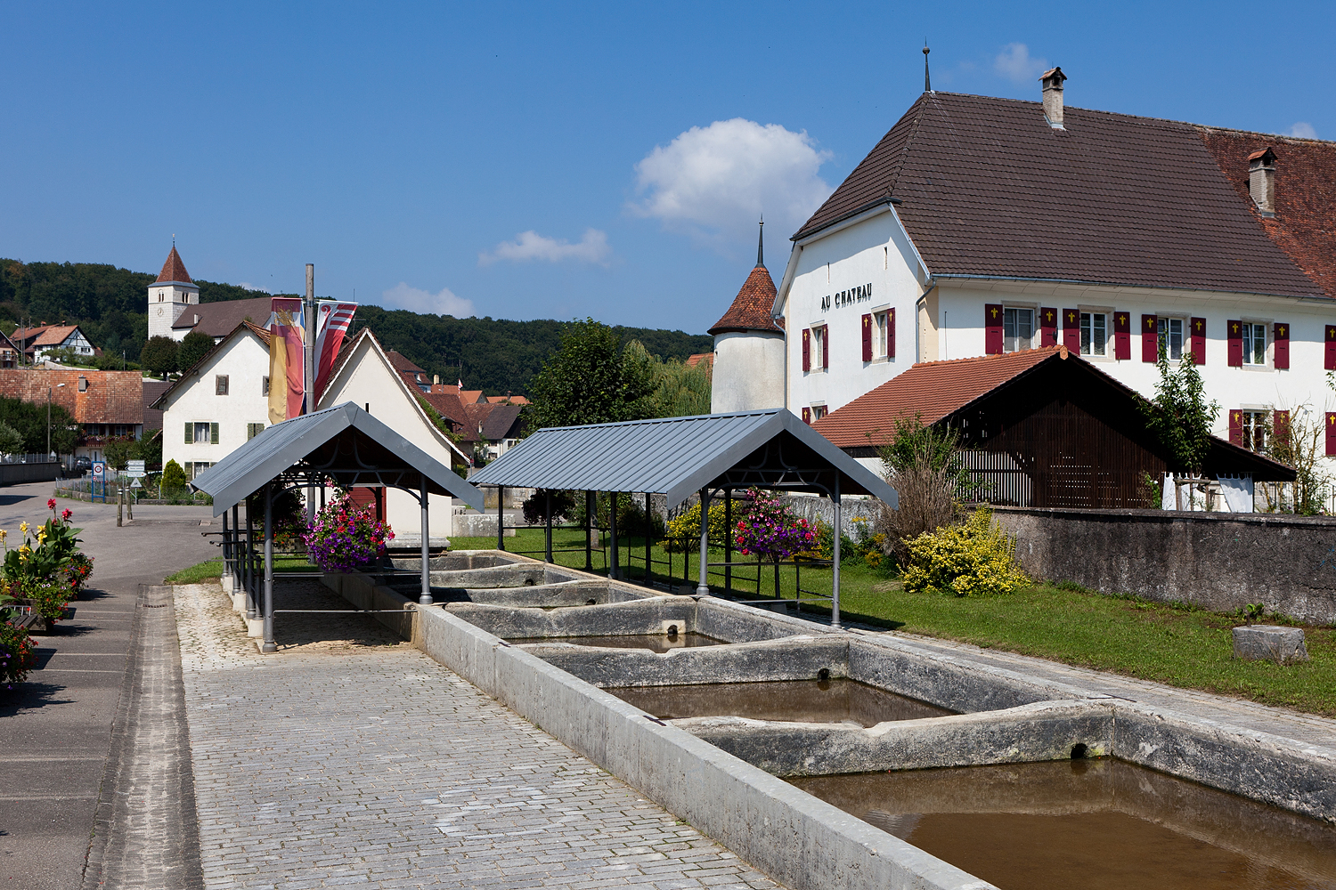 Waschhaus und Waschbrunnen mit Schloss in Coeuve (JU)